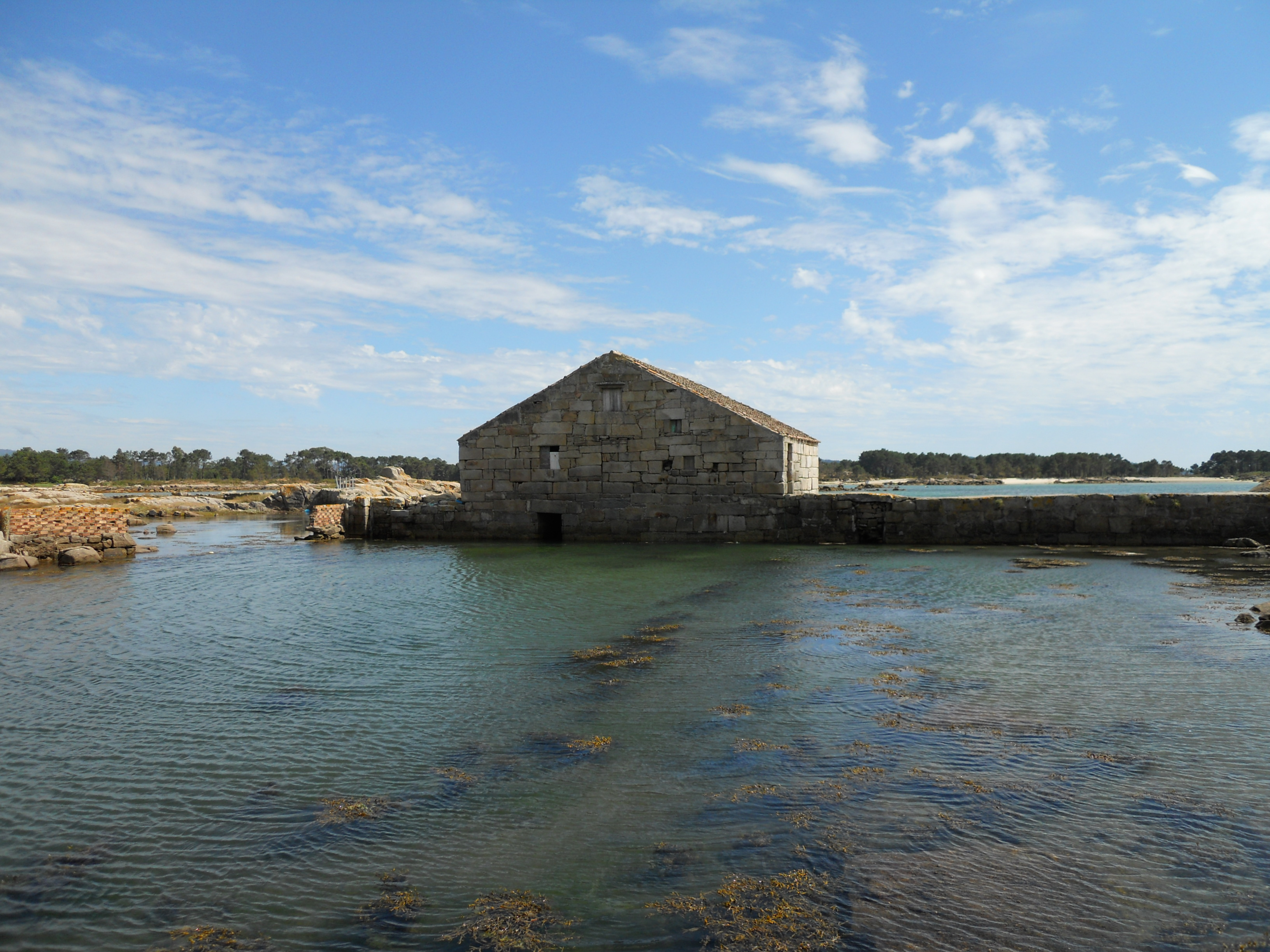 Muíño de mareas das Aceñas, A Illa de Arousa.